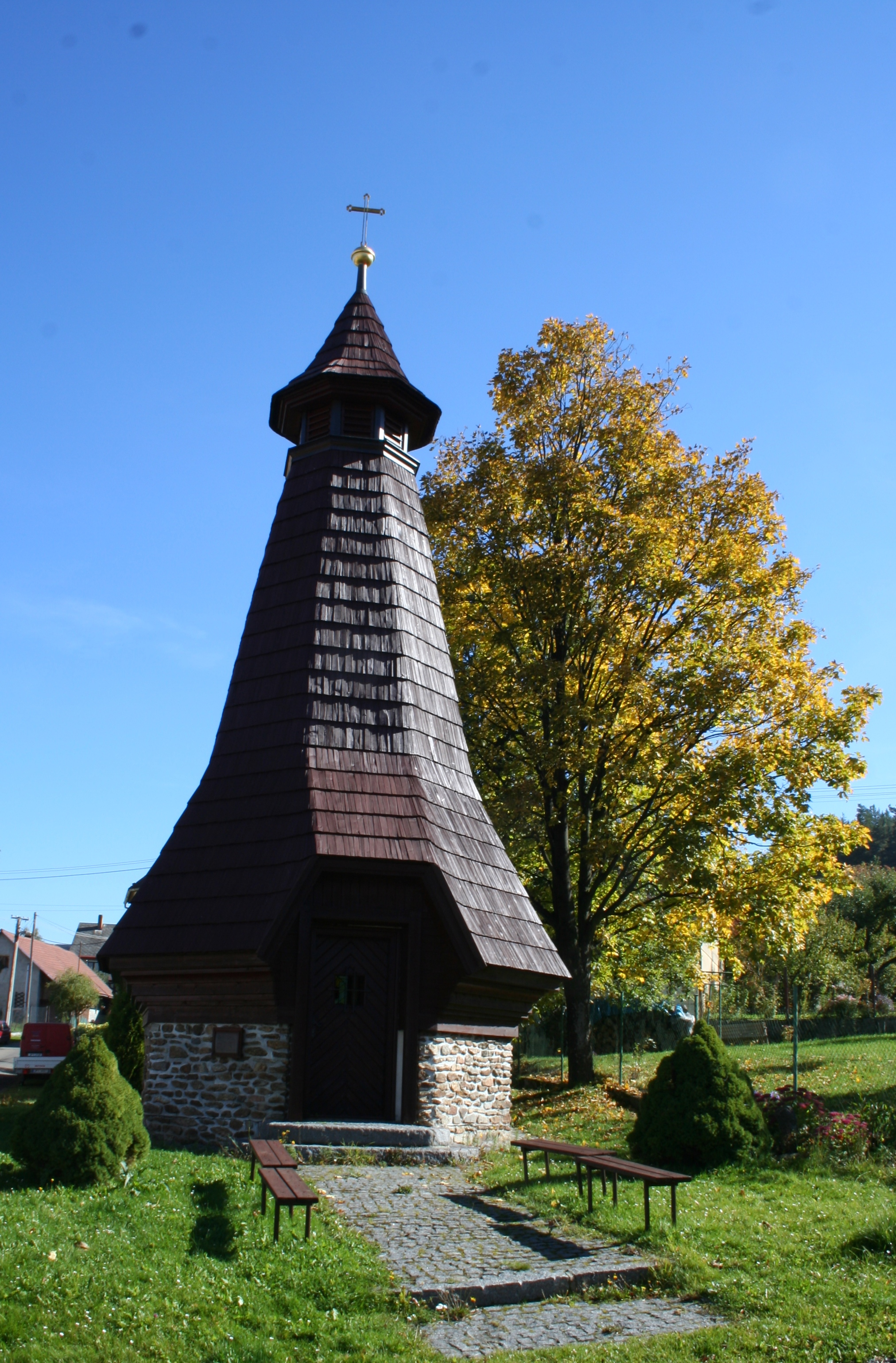 Kaplička v Pohorsku